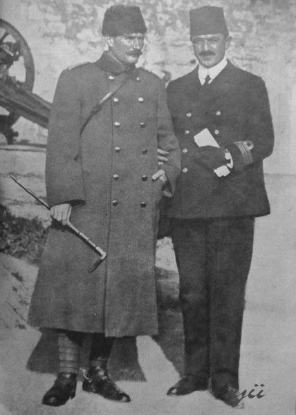 Atatürk ve Rauf Orbay